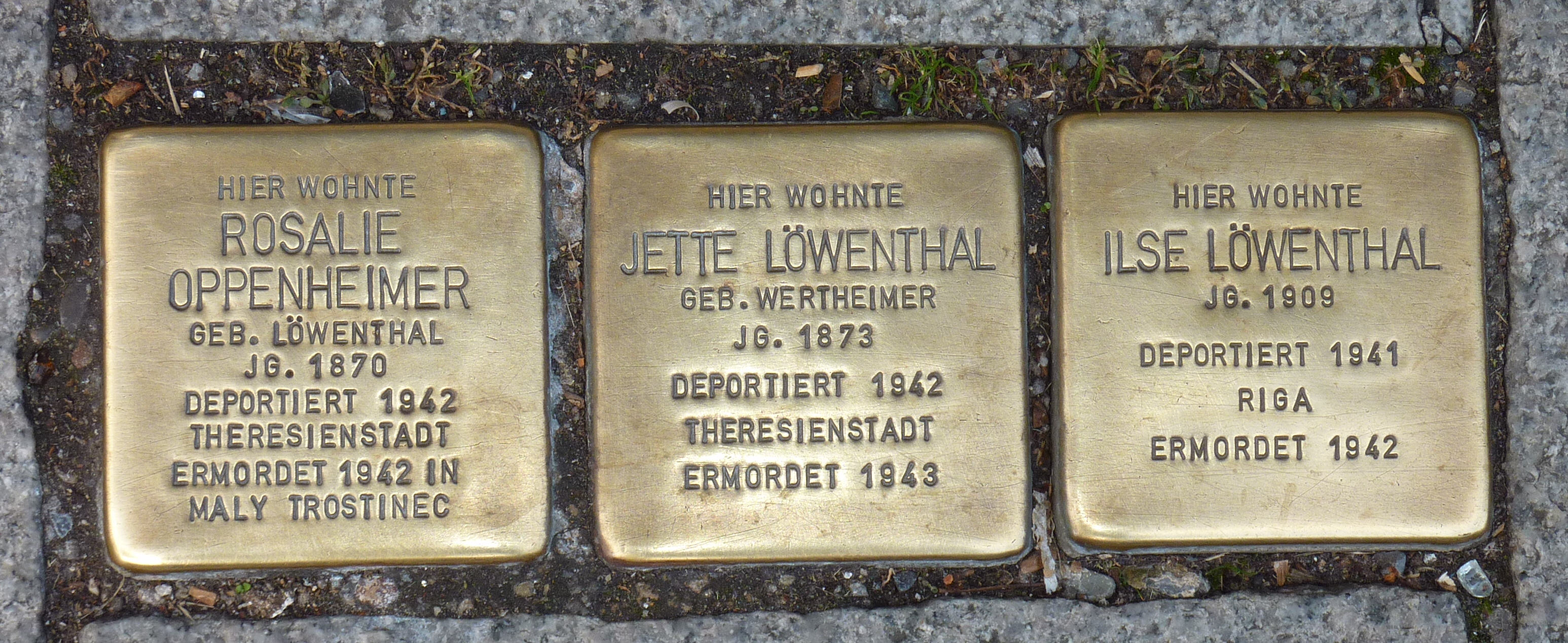 Stolpersteine für Angehörige der Familie Oppenheimer/Löwenthal